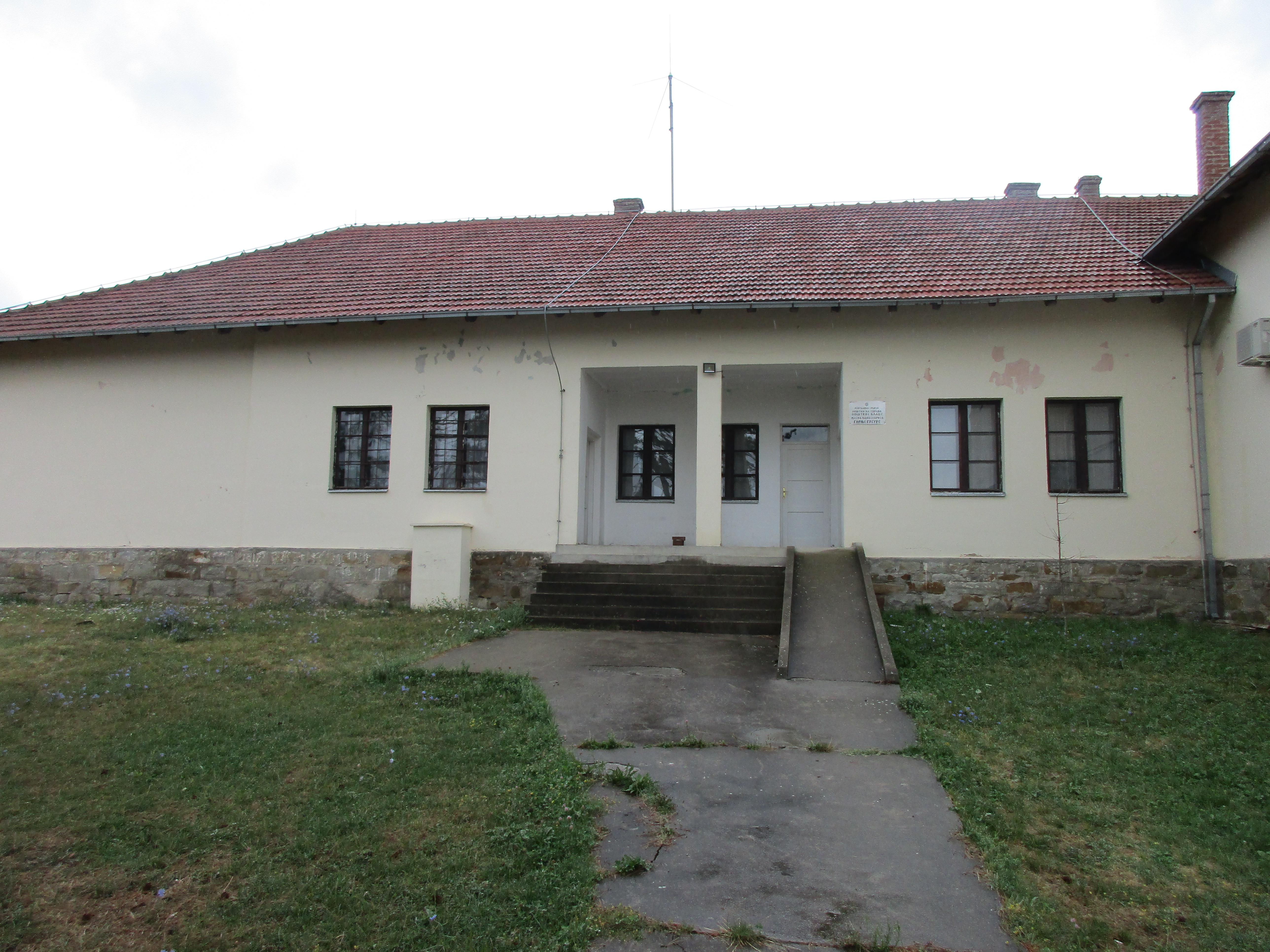 Srpski (latinica): Narodni muzej Toplice, Grgure